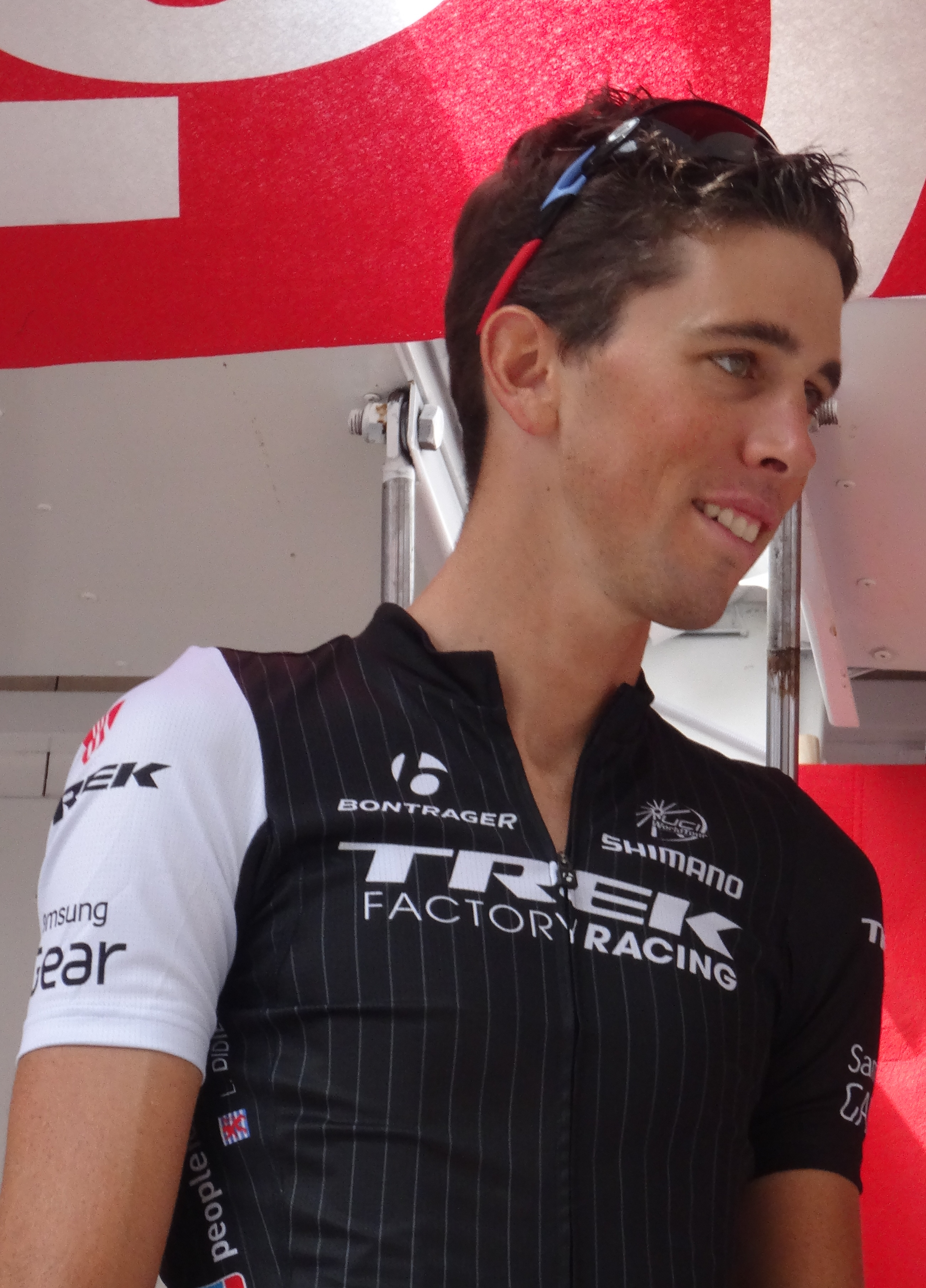 Reportage photographique réalisé le samedi 26 juillet à l'occasion du départ de la première étape du Tour de Wallonie 2014 à Frasnes-lez-Anvaing, Belgique.